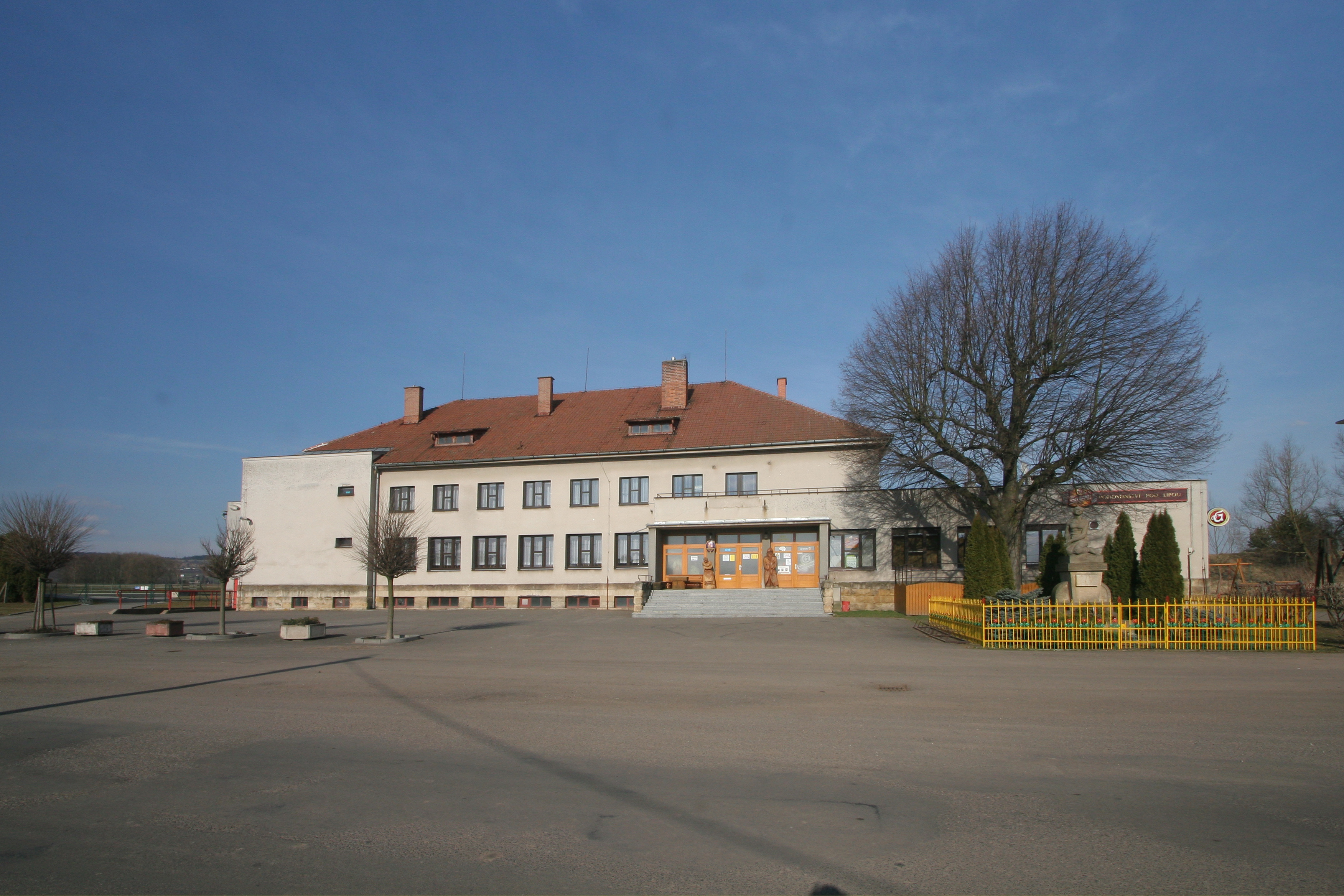 Dobrá voda u Hořic - kulturní dům